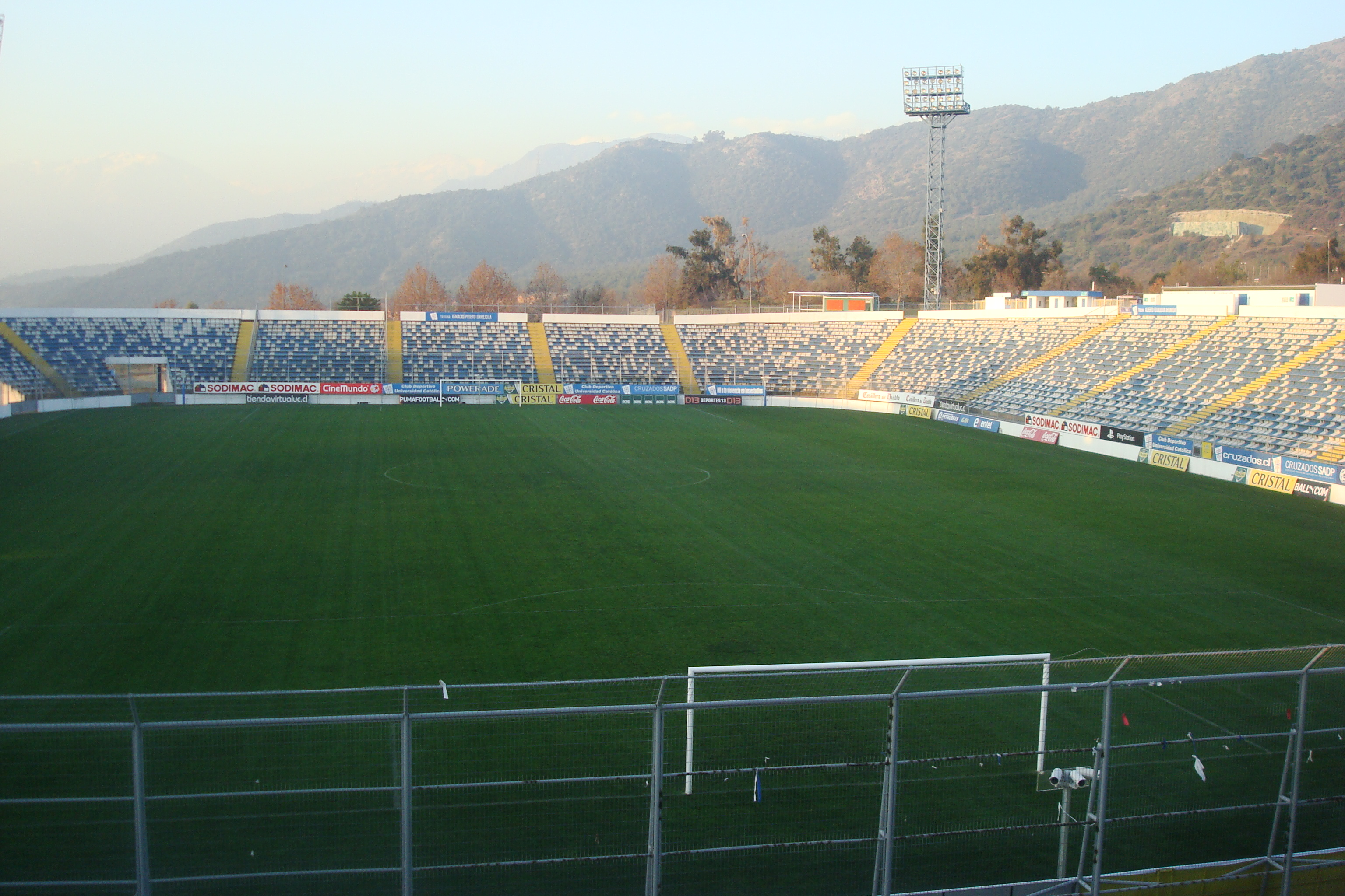 Estadio San Carlos de Apoquindo, Las Condes, Santiago de Chile